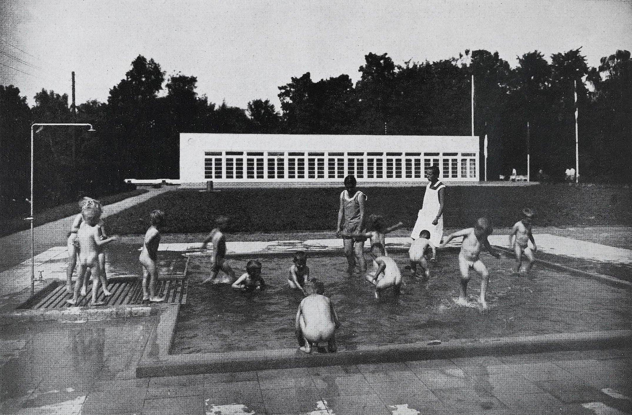 Brodzik wzorcowego sanatorium dla dzieci